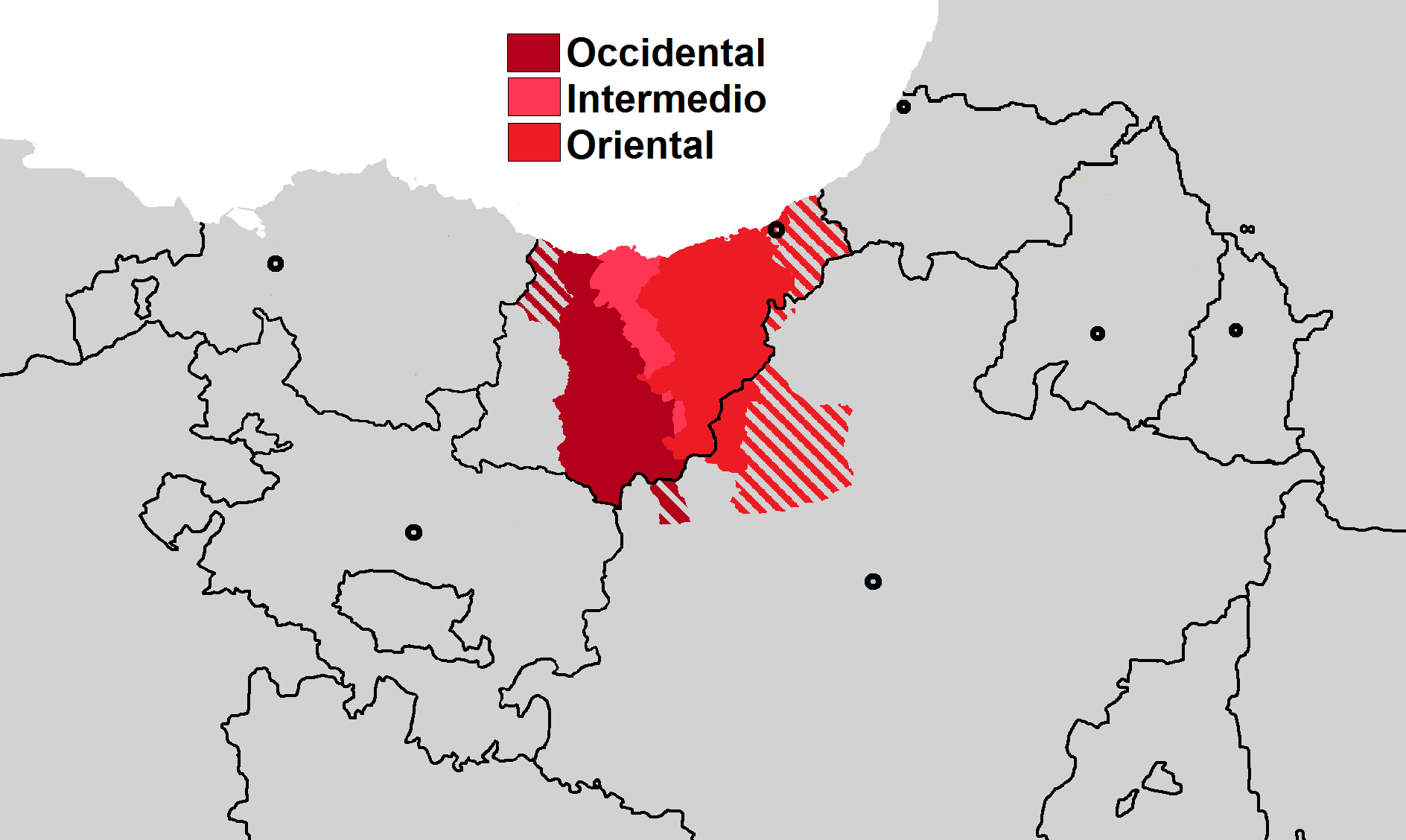 Dialectos guipuzcoanos del euskera.